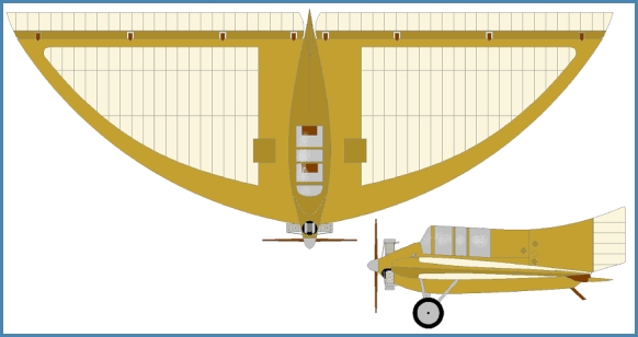 Tscheranovsky_BiTsch7a